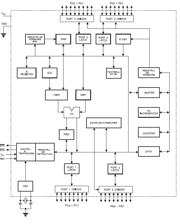 Diagrama Block a circuitului AT89LV51